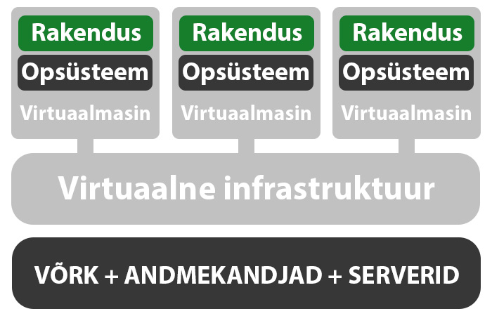 VDI ülesehitust iseloomustav diagramm.